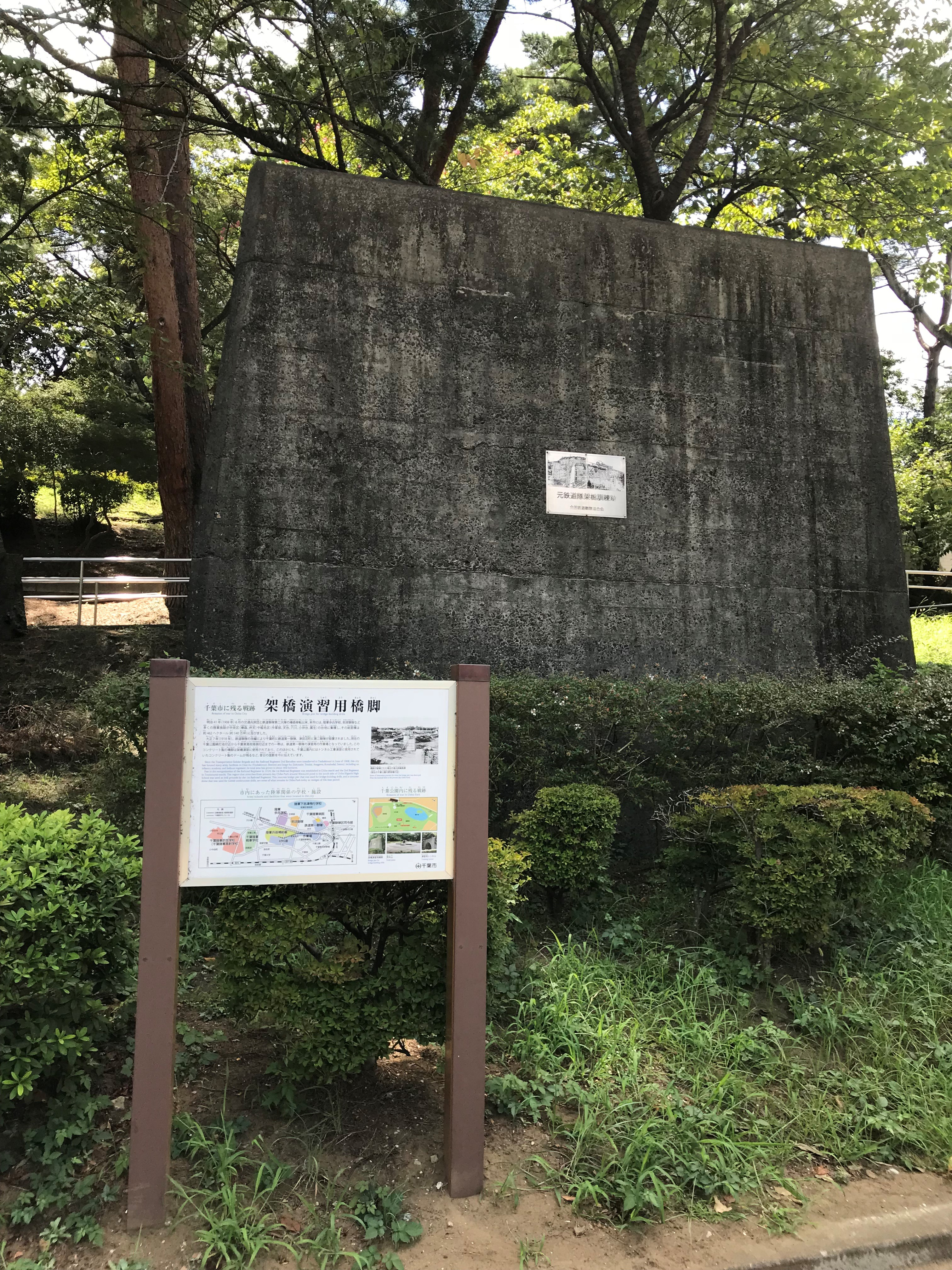 大日本帝国陸軍鉄道連隊の演習に用いられた橋脚